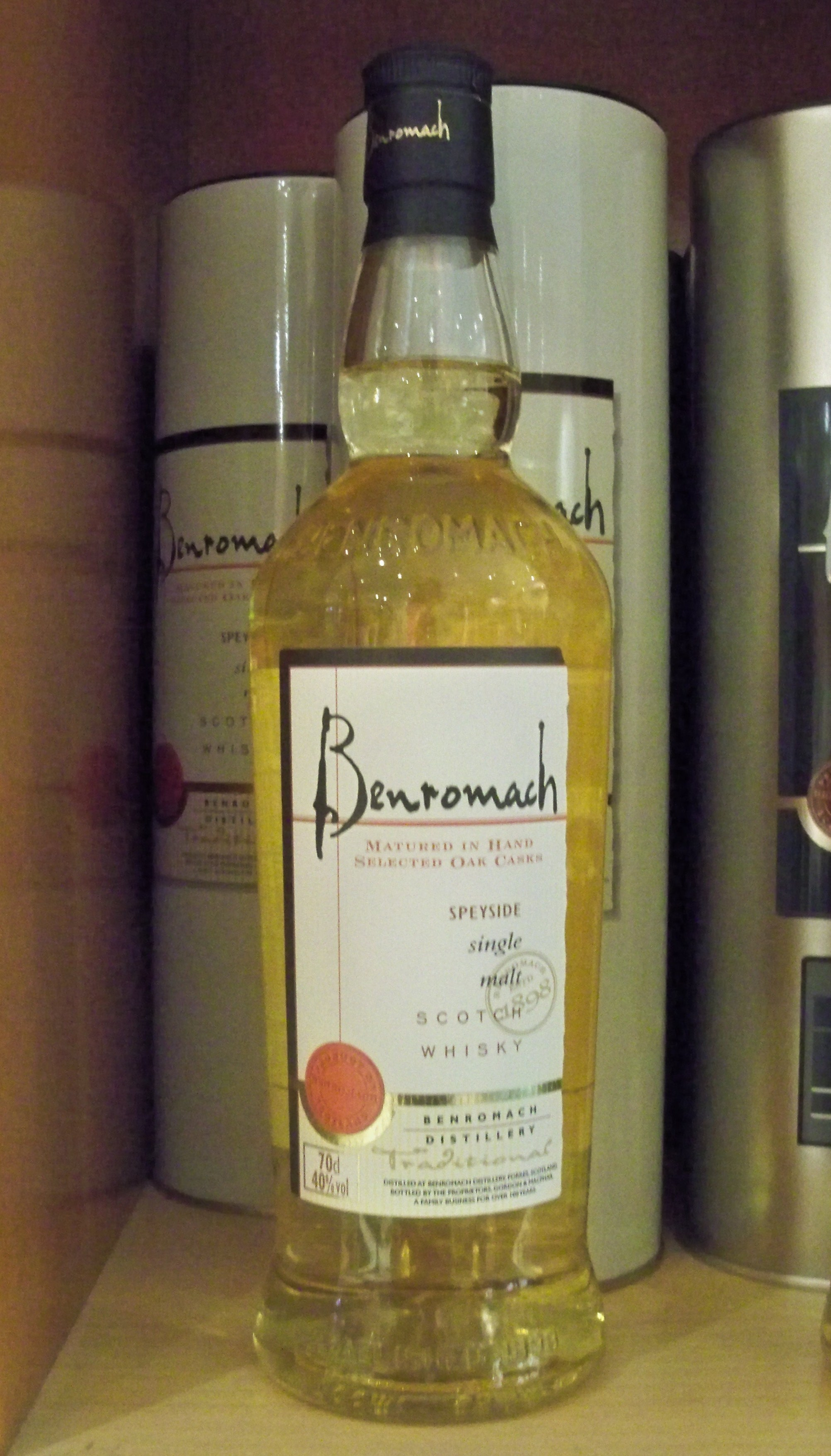 bouteille de whisly de la distillerie Benromach